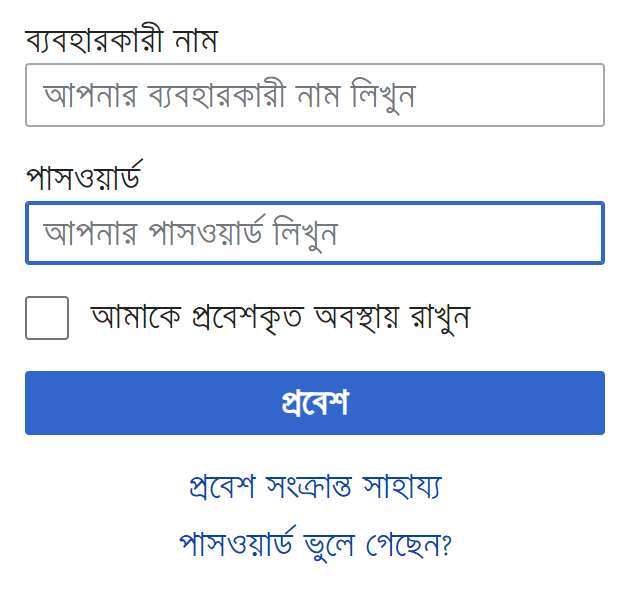 মিডিয়াউইকি ১.৩৪ প্রবেশকরণ ফরম